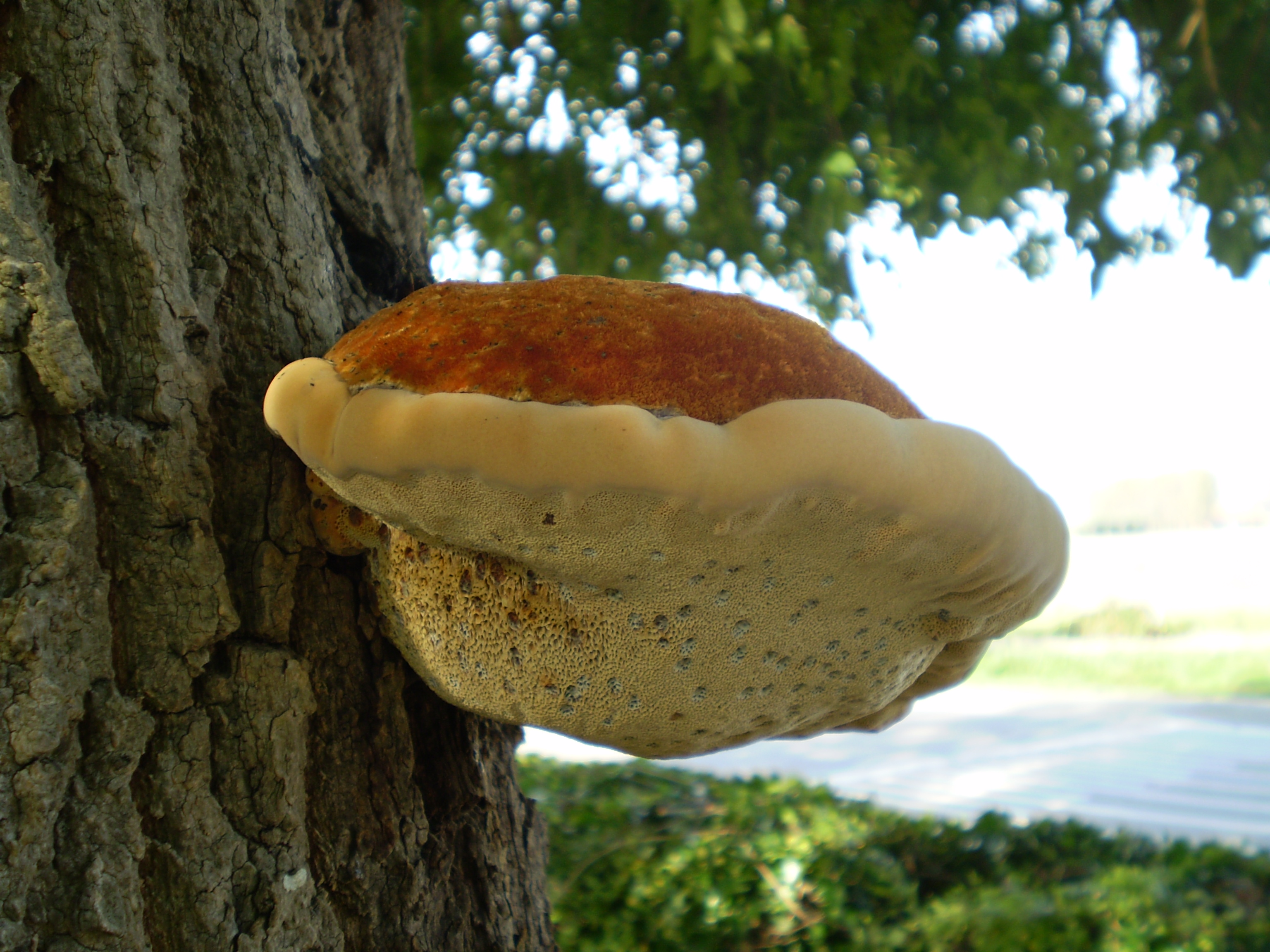 Polypore hérissé (Inonotus hispidus)